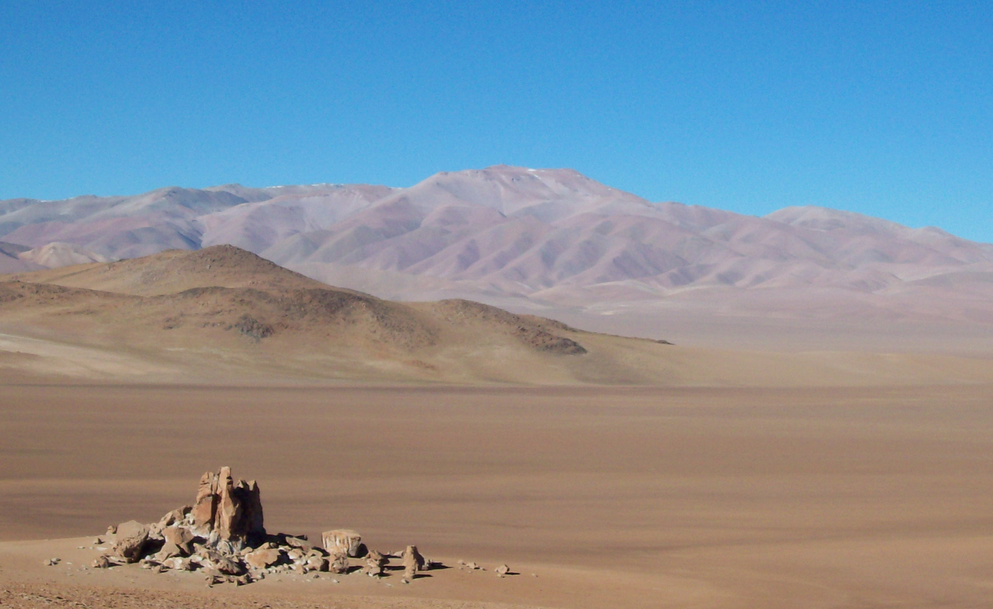 Се́рро-Гала́н